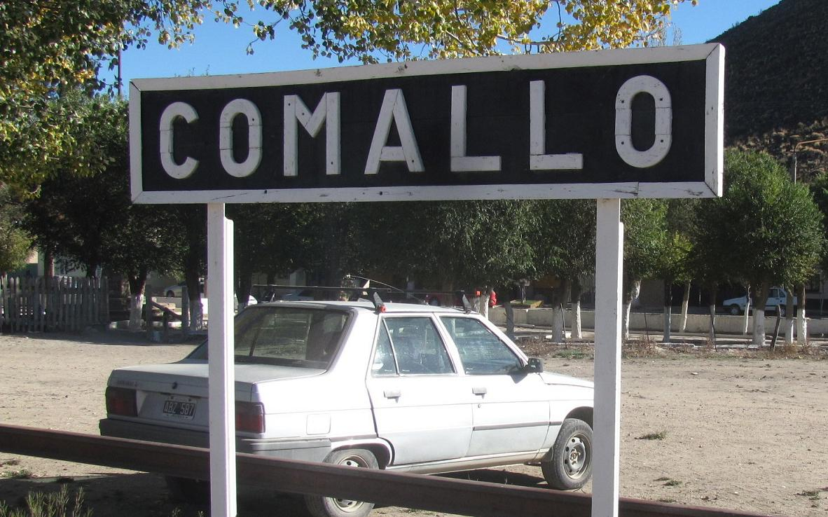 Estación Comallo, provincia de Río Negro, Argentina.